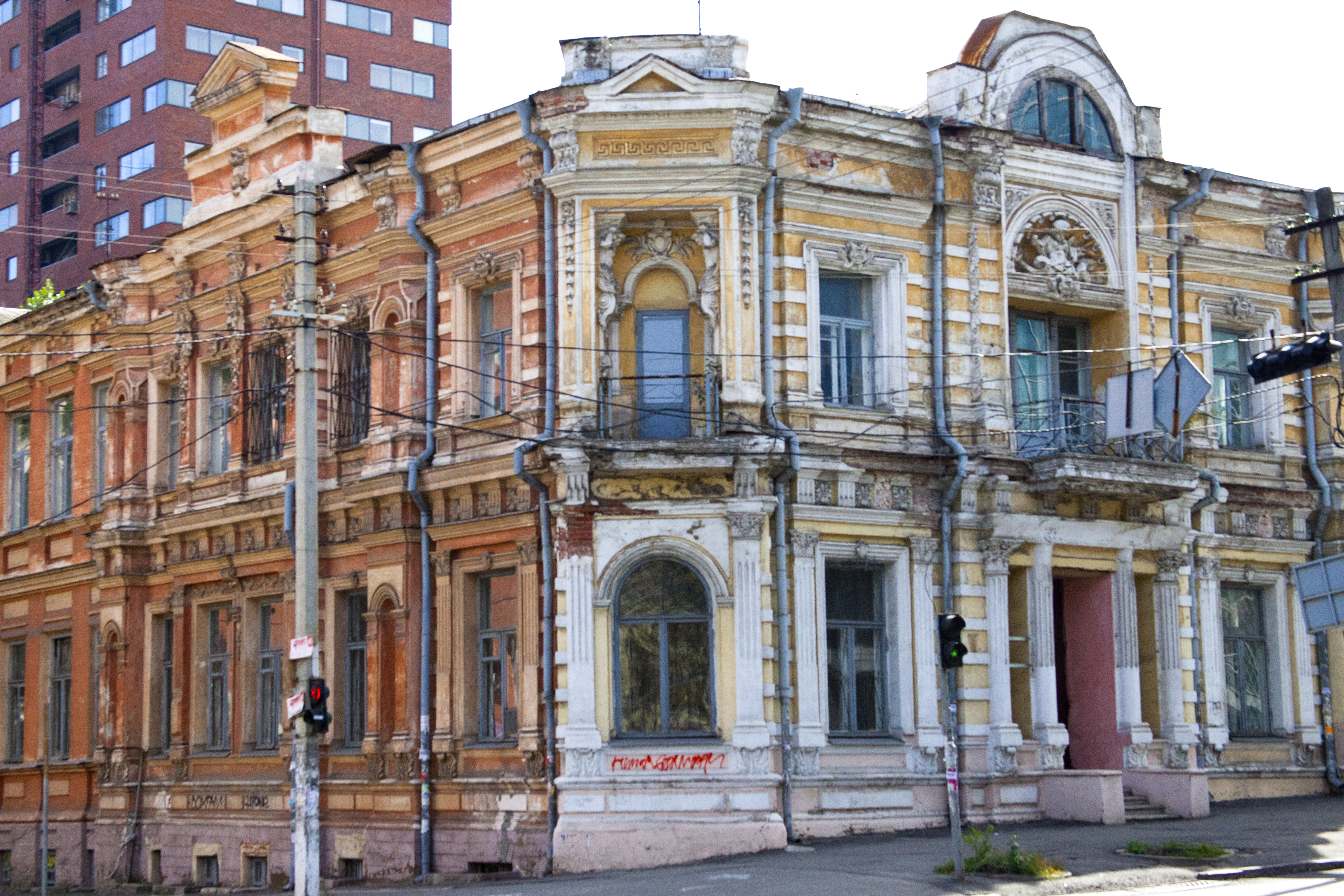 Доходний будинок з аптекою, Дніпропетровськ, Артема вул., За